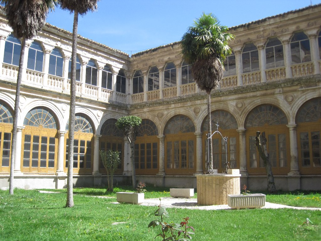 Claustro de Santo Domingo de Guzmán de Ocaña (Toledo).